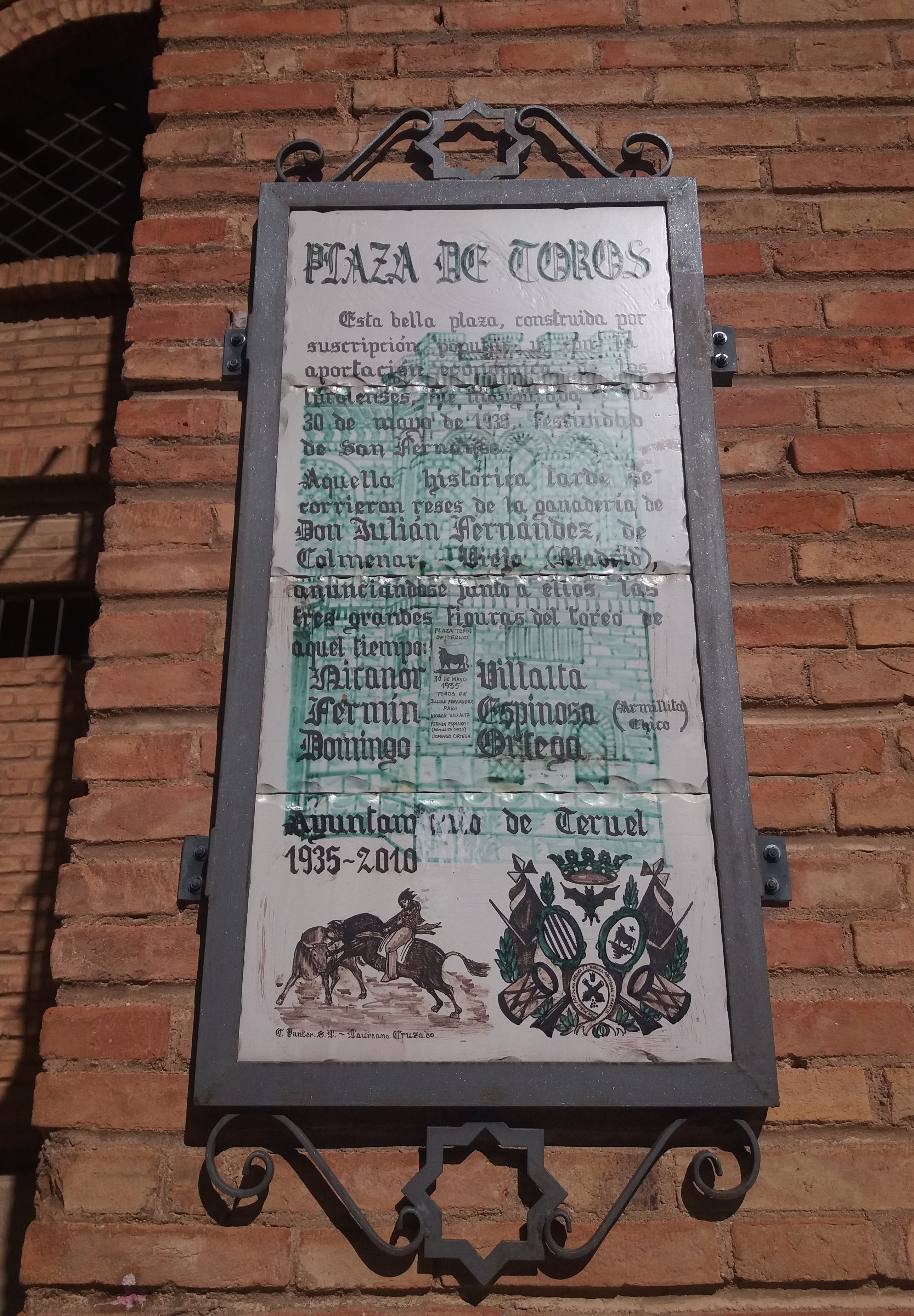 Plaza de toros de Teruel (España)